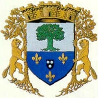 Armoiries Verrières Le Buisson